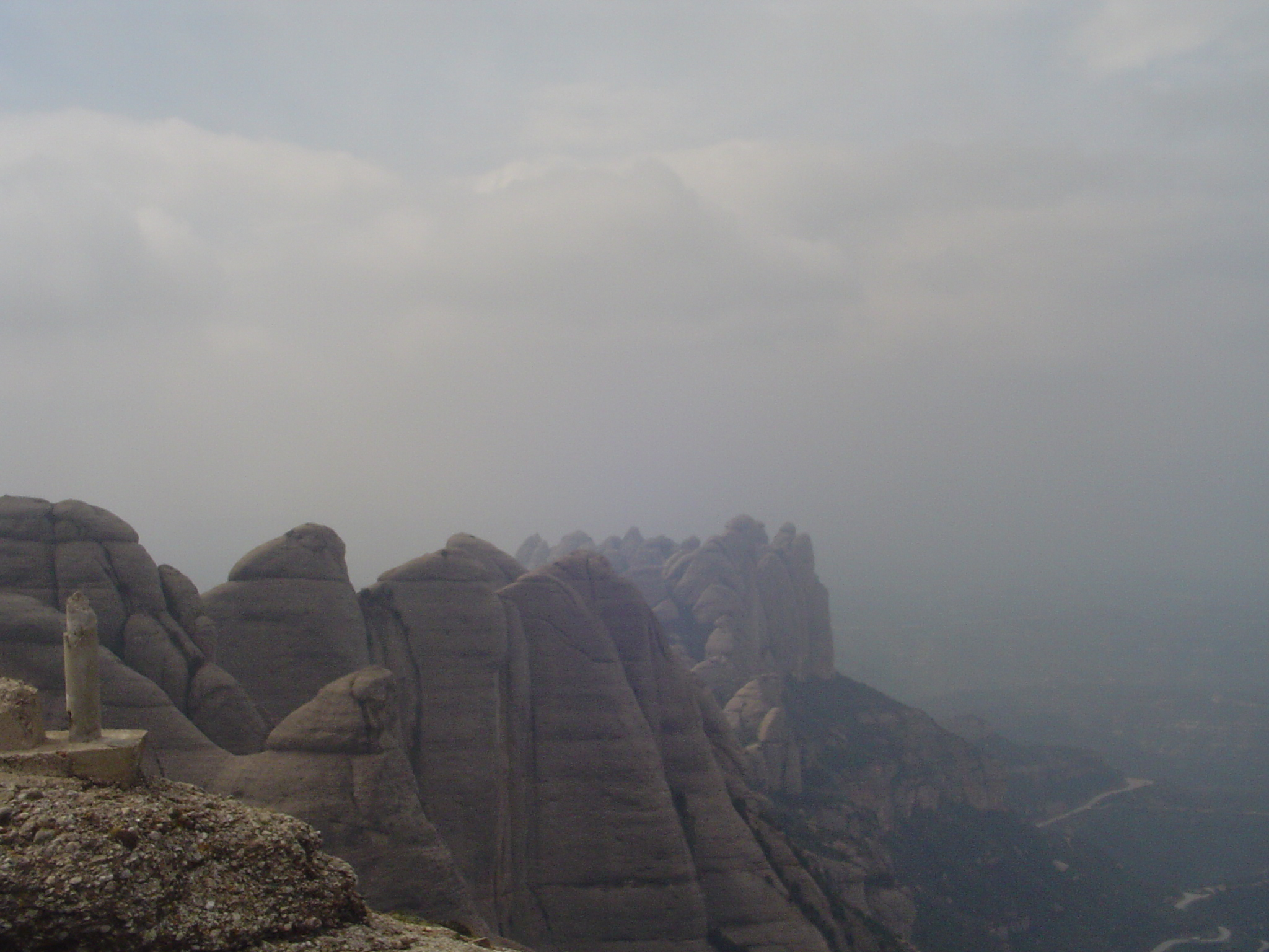 Les Agulles des del Mirador de Sant Jeroni (abril 2007)